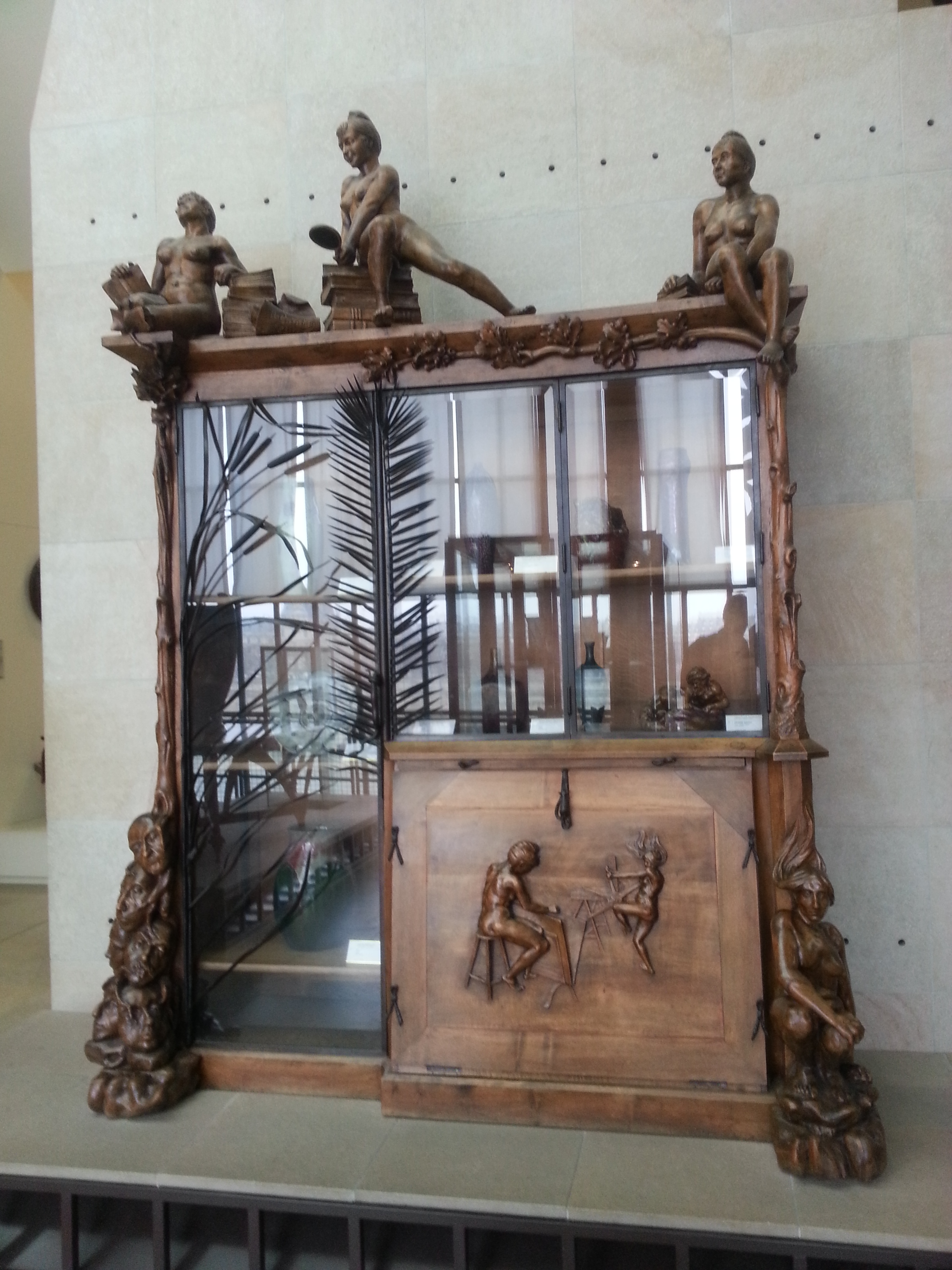 Bibliothèque de François-Rupert Carabin en noyer et fer forgé (1890)